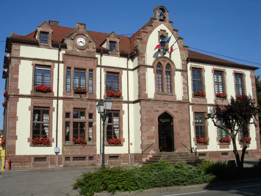 Mairie de Bartenheim